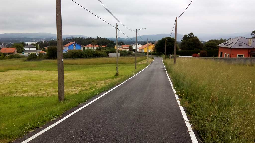 Vista das Viñas, Trasancos.